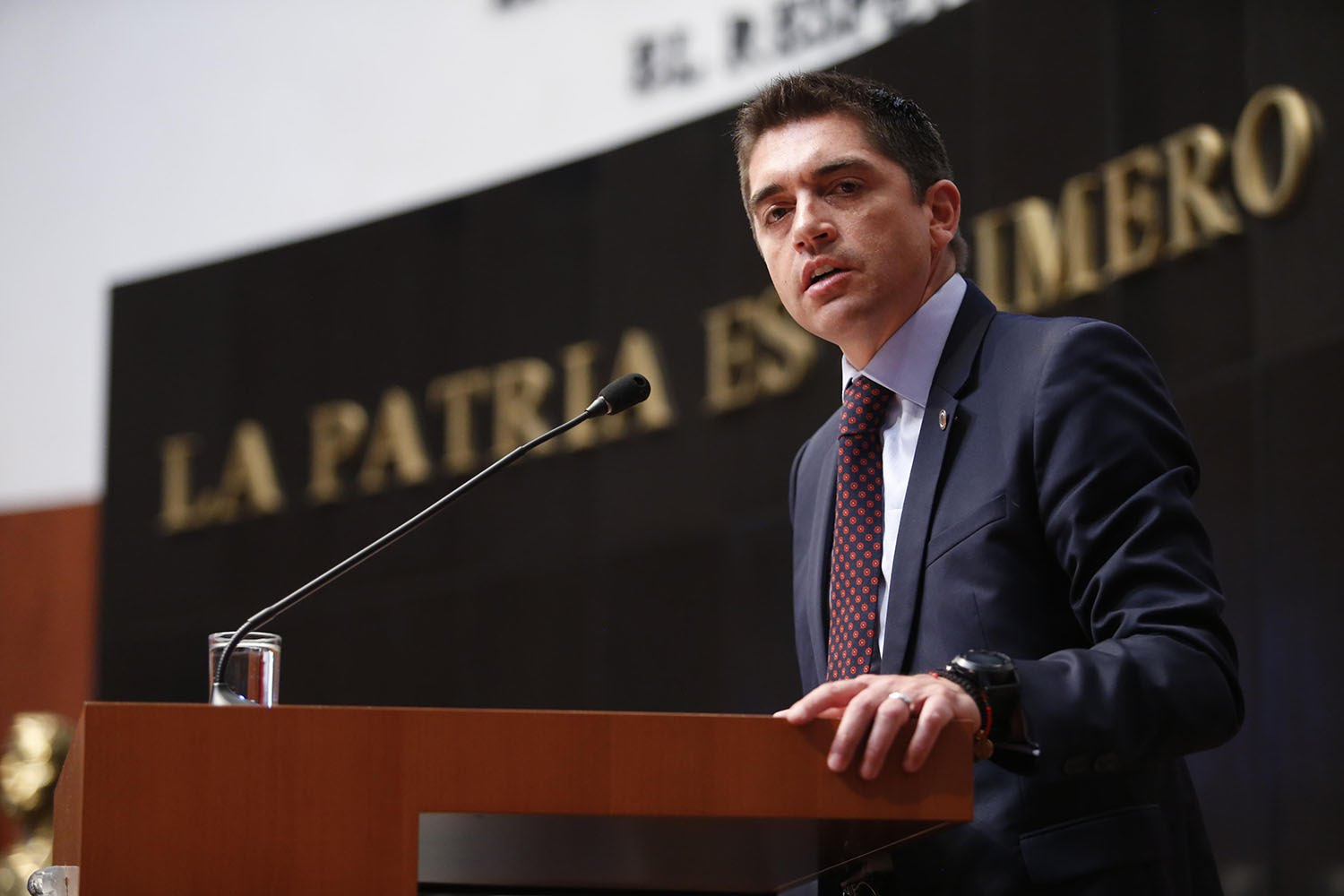 Senador Luis Fernando Salazar